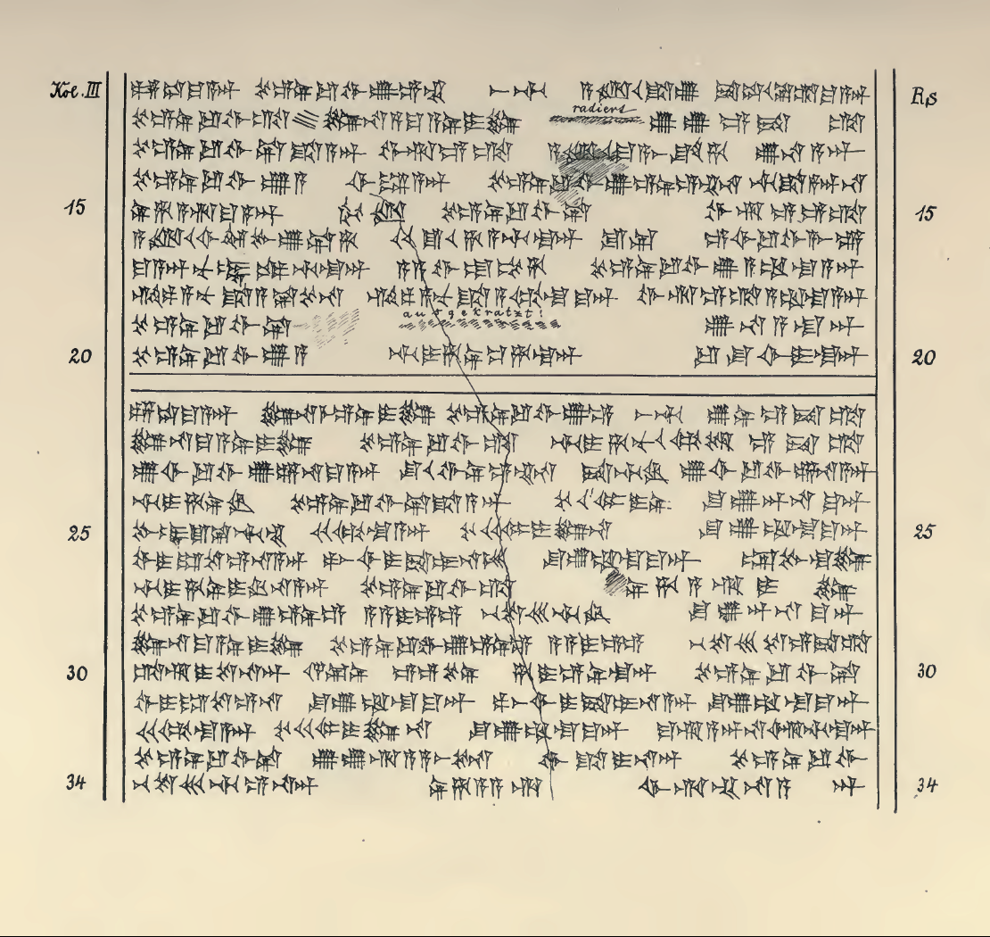 List Tuszratty do Amenhotepa III w języku huryckim – autografia.